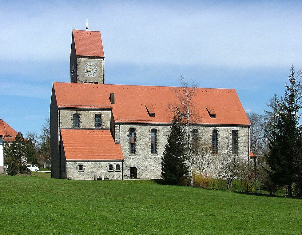 Hegge